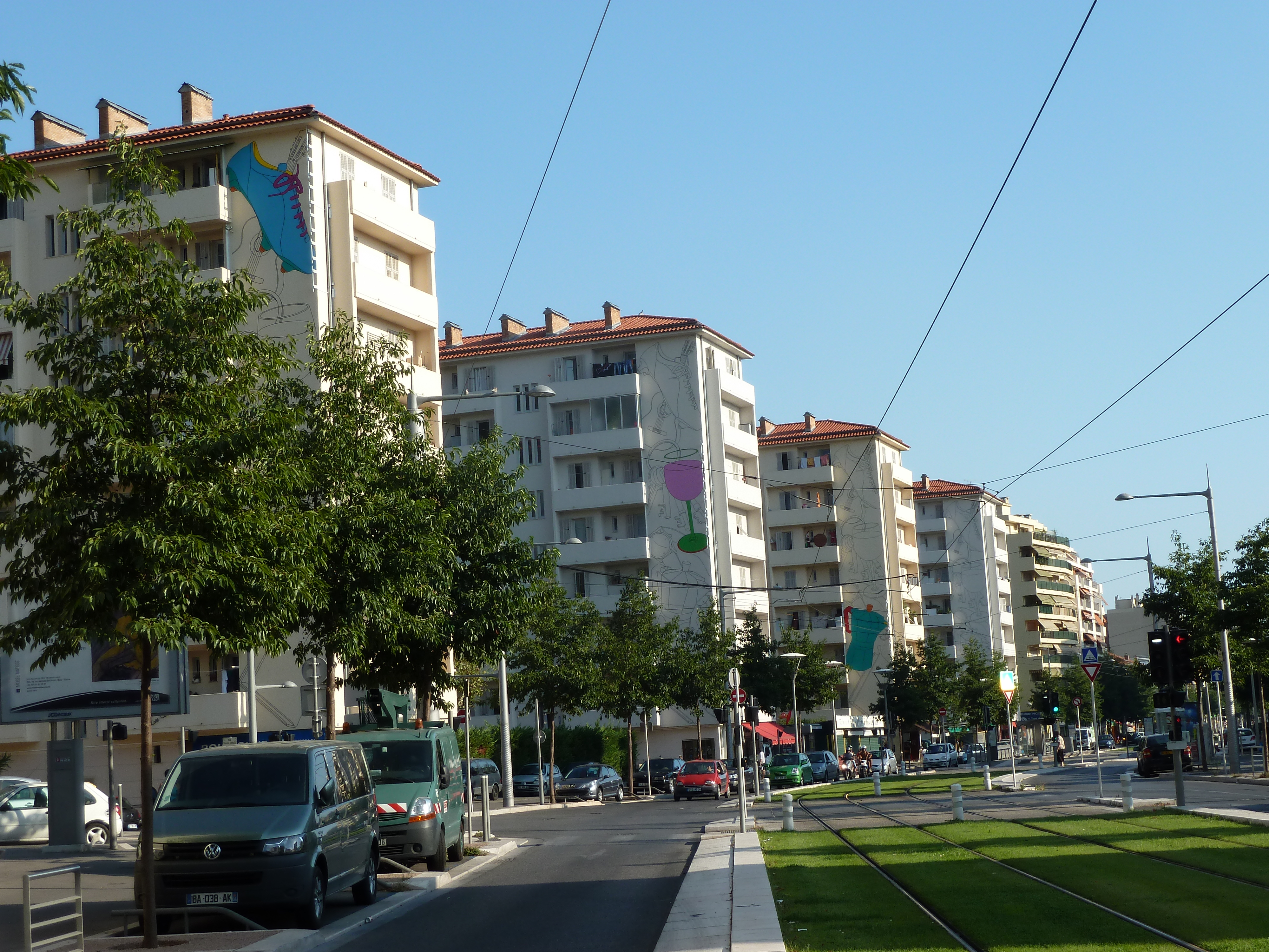 Œuvre "Cascade d’objets" de Michael Craig Martin